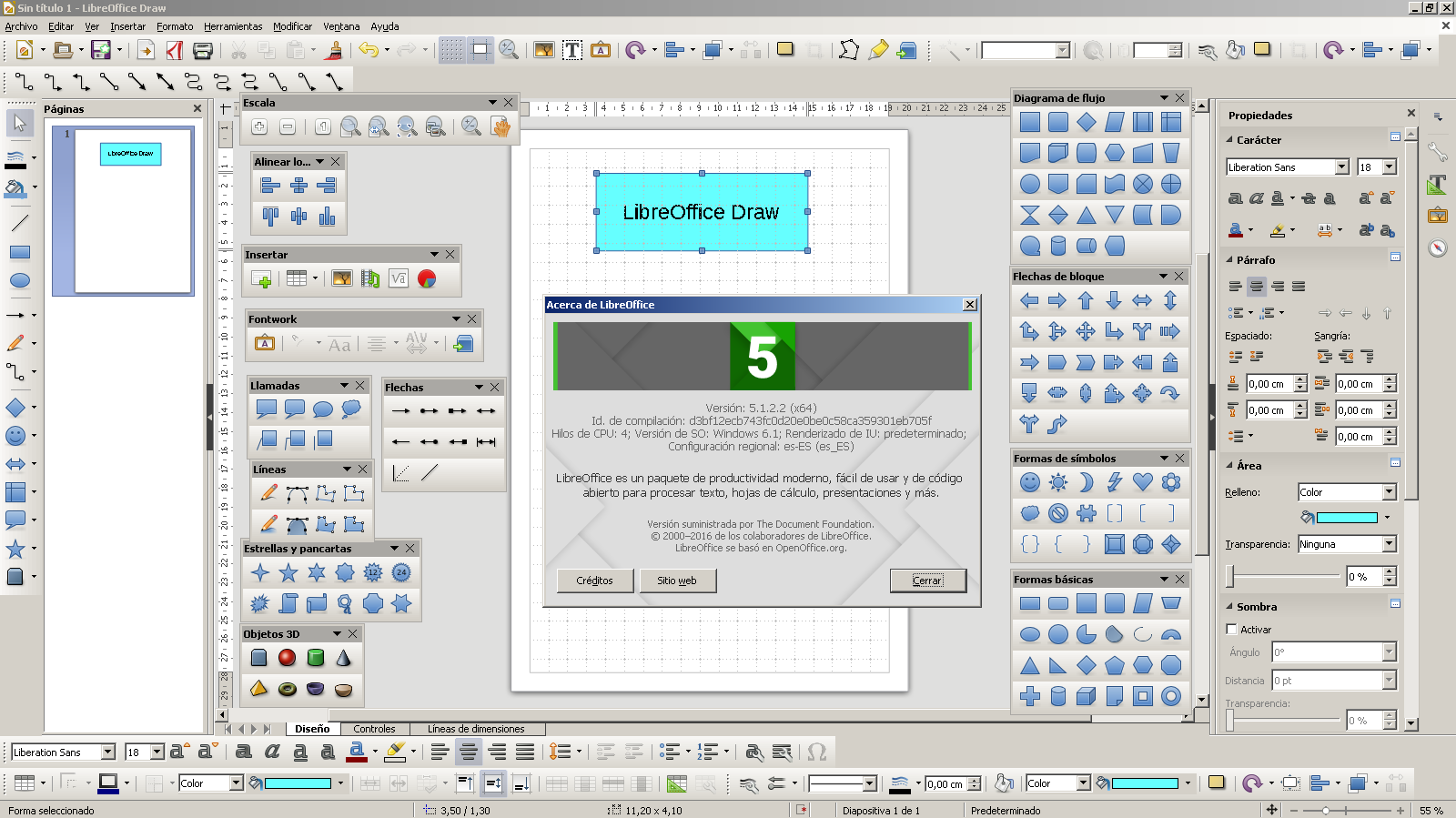 Captura de Pantalla de LibreOffice Draw 5.1.2.2 (x64) con varias barras de herramientas visibles